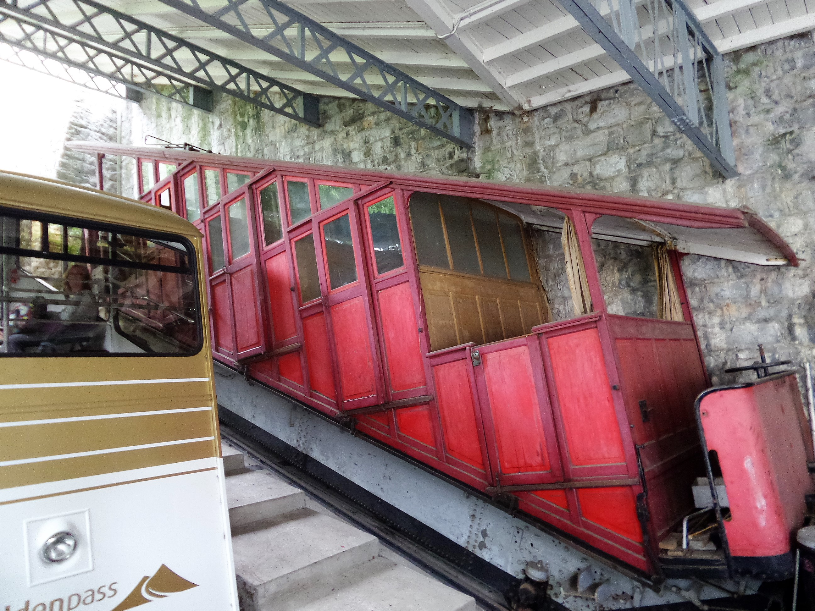 Standseilbahn Territet-Glion, Montreux, Chemin de fer funiculaire Territet–Glion